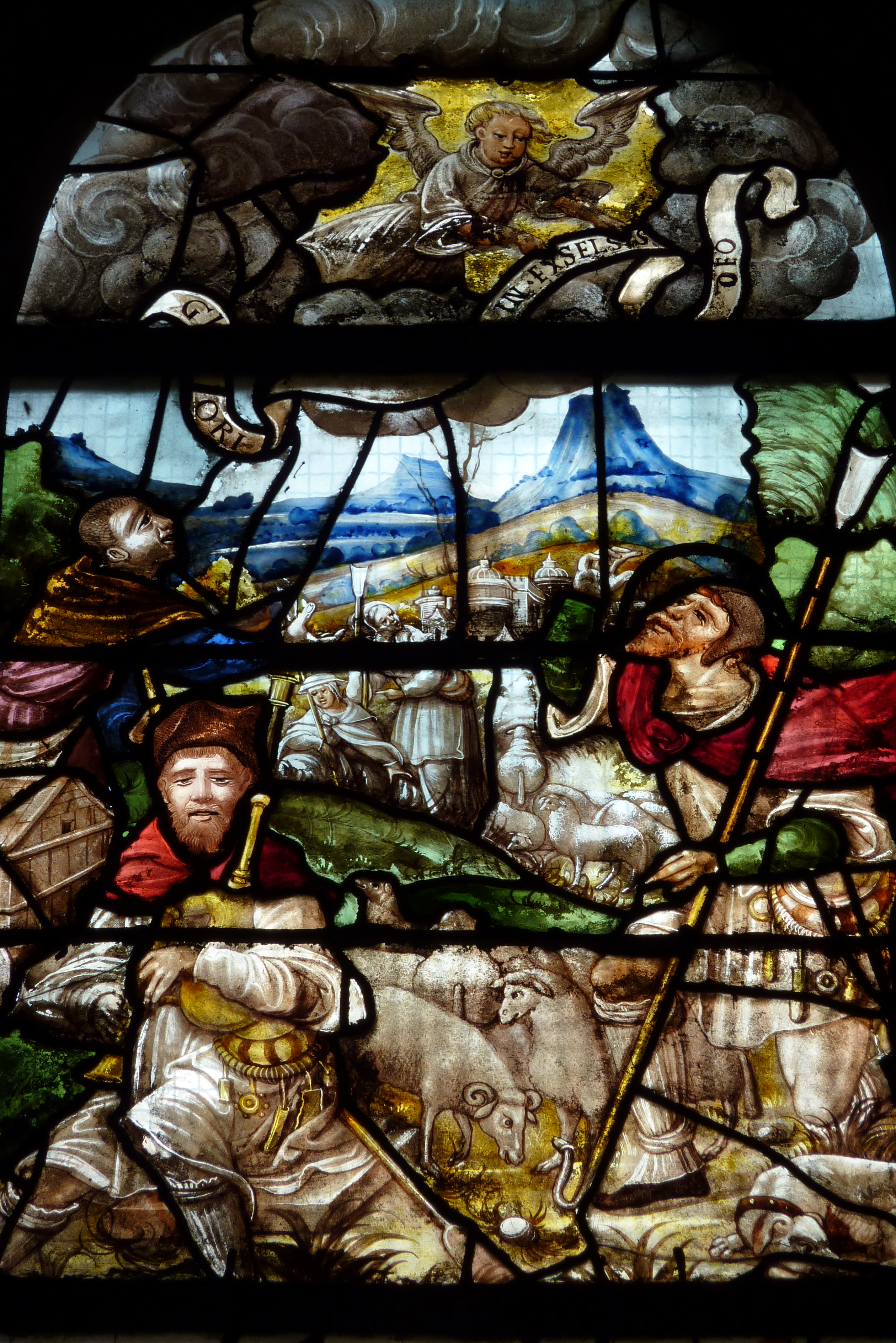 Bleiglasfenster (Ausschnitt) Nr. 16 in der katholischen Pfarrkirche Saint-Pierre in Montfort-l’Amaury, Darstellung: Verkündigung an die Hirten (siehe Laurence de Finance, Marie-Huguette Hadrot: Les verrières de l'Église paroissiale Saint-Pierre, Inventaire général S.P.A.D.E.M., 1994)